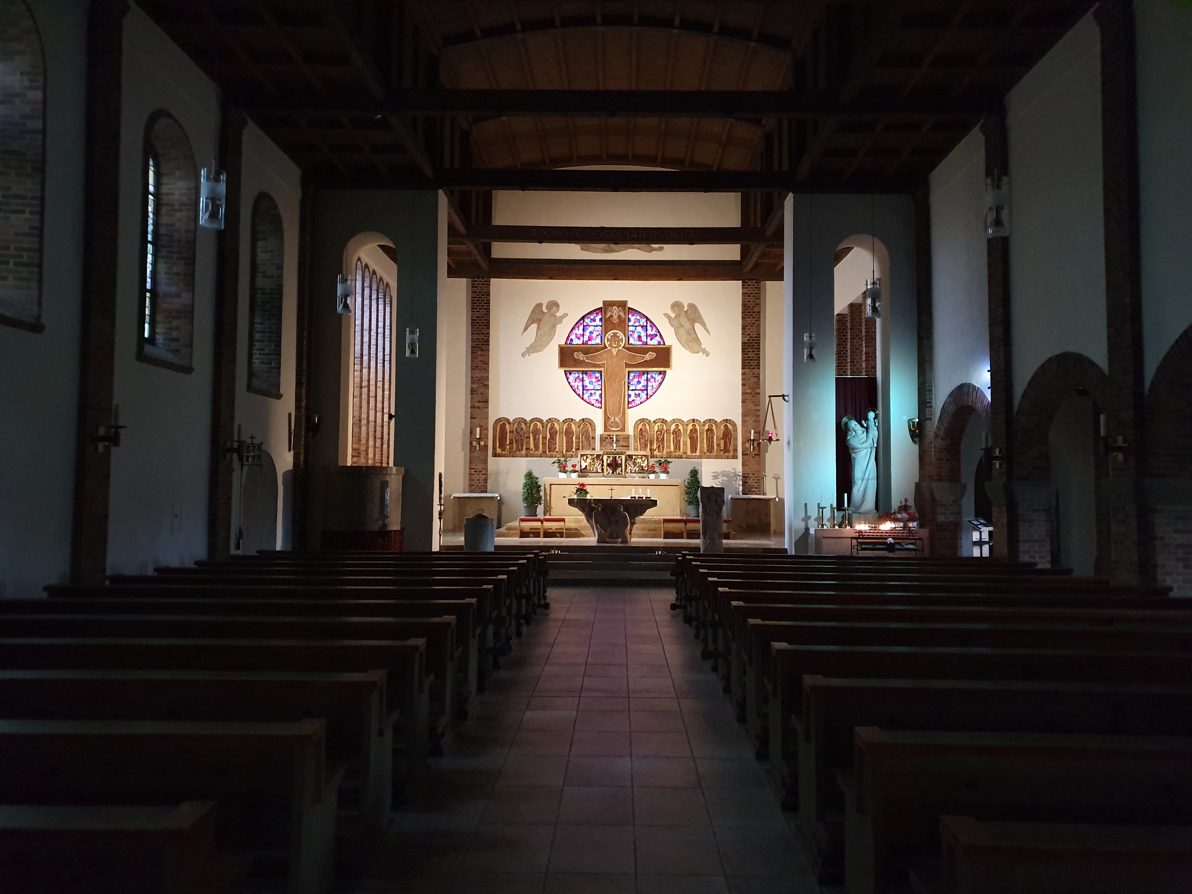 Innenansicht der Pfarrkirche St. Thomas von Aquin in Trockau, Stadt Pegnitz, Bayern